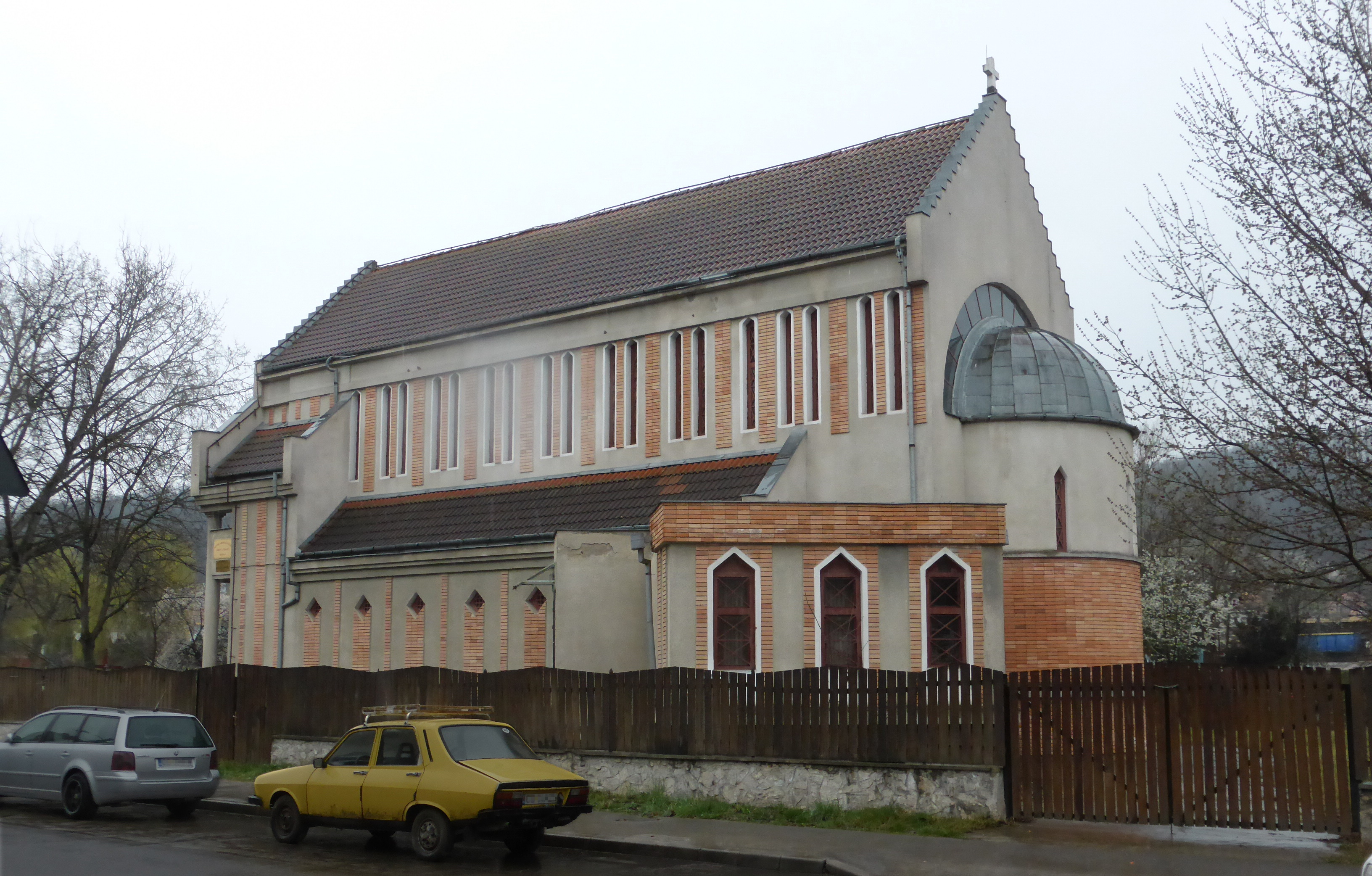 Reschitz (Kreis Karasch-Severin), Kirche St. Anton.